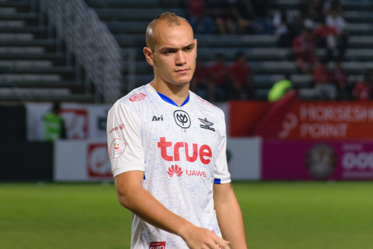 Manuel Bihr